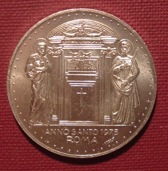 Eigen foto